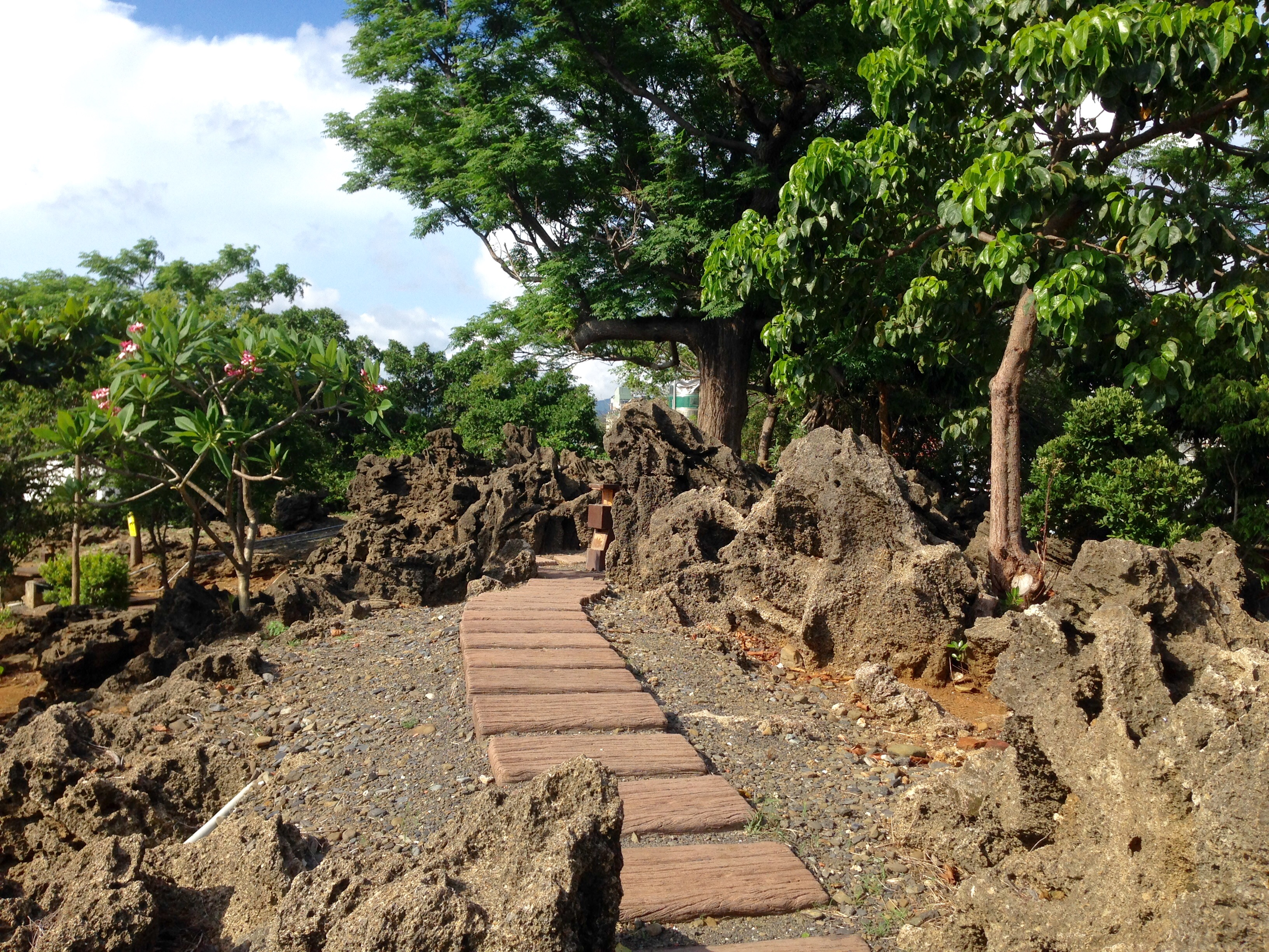 中文（台灣）: 猴洞山步道